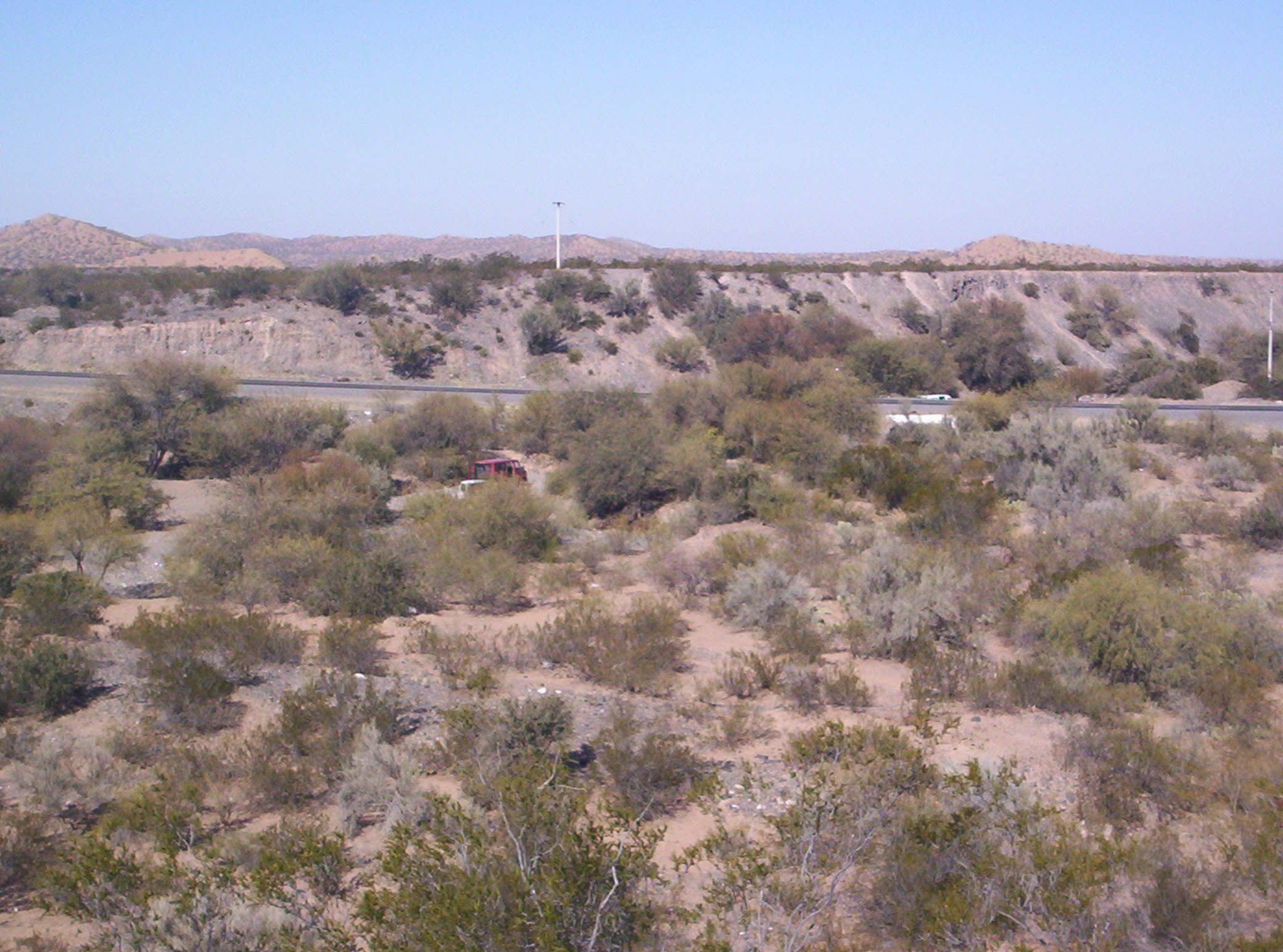 Vista un típico paisaje semidesertico de la provincia argentina de San Juan